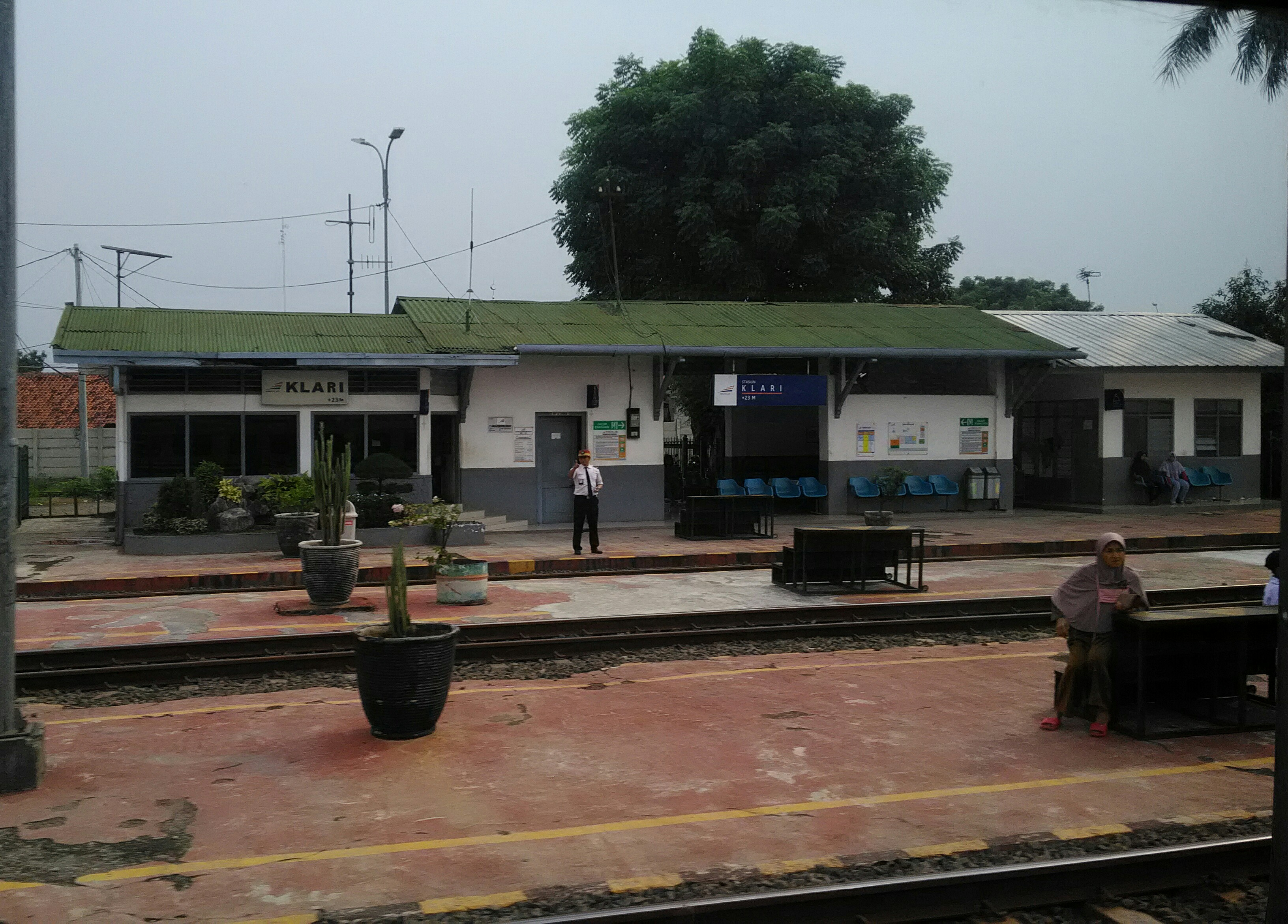 Stasiun Klari, 2019